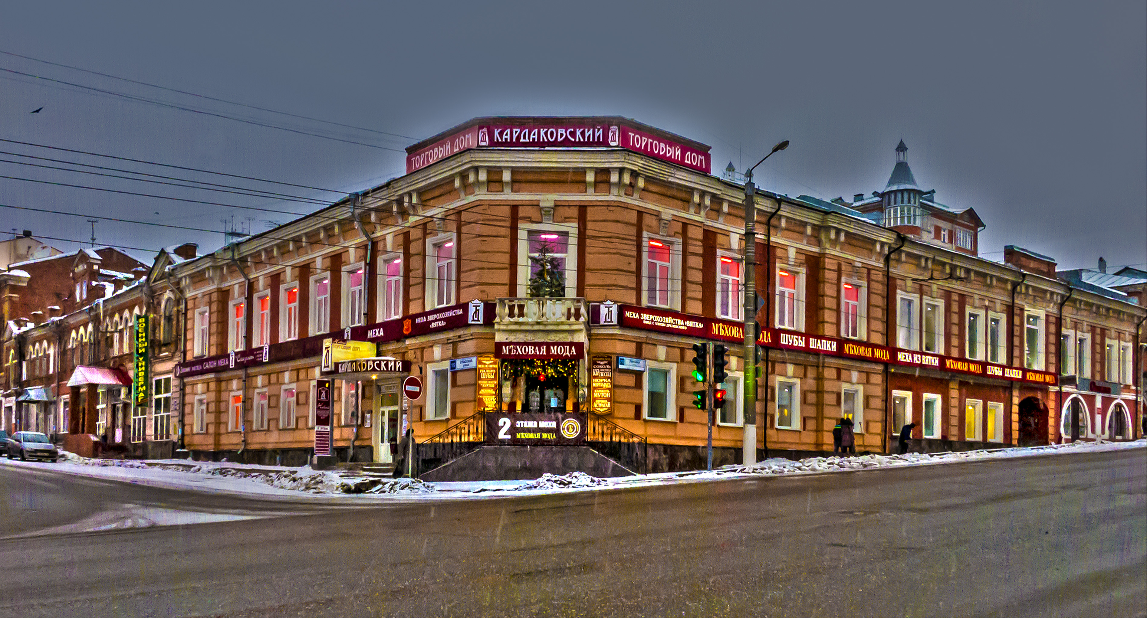 Здание Волжско-Камского банка: улица Спасская, 19, Киров, Кировская область